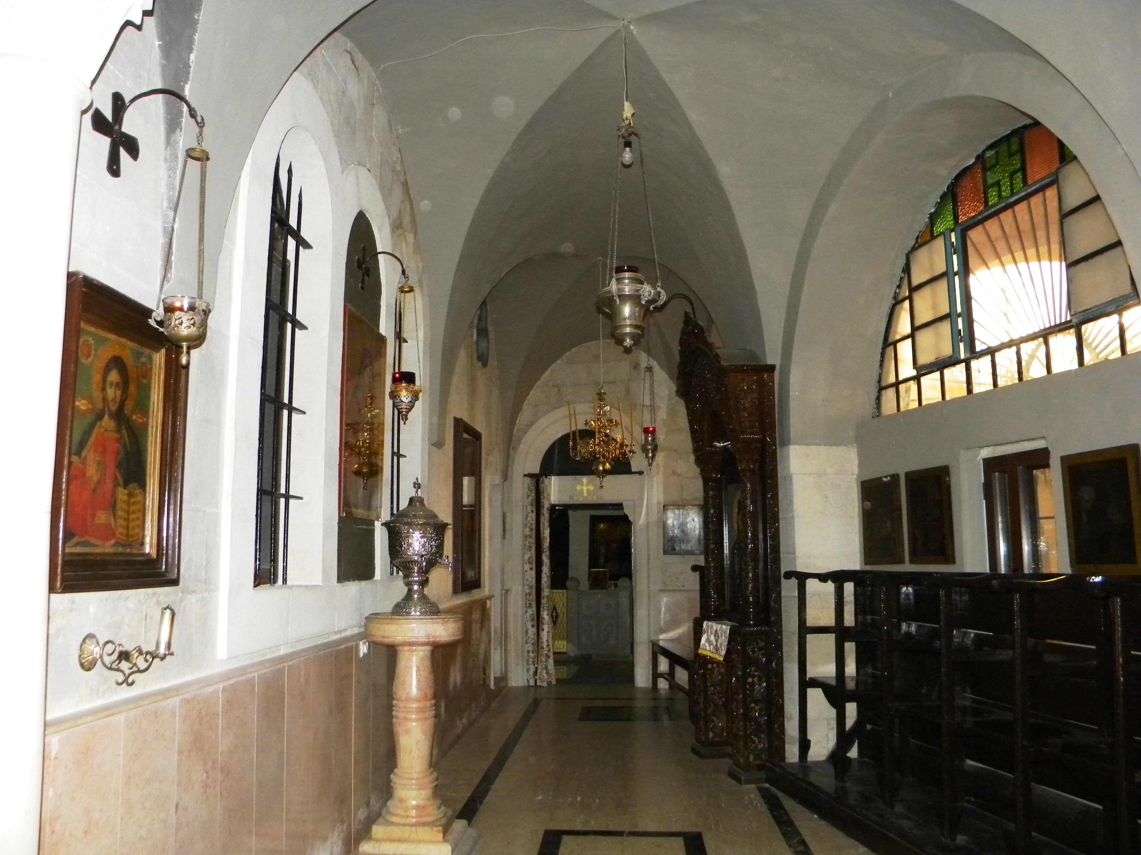 Palestine, Wadi Qelt, (Valea Hozevei) (St. George's Monastery having the relics of Sf. Ioan Iacob Hozevitul) (12)